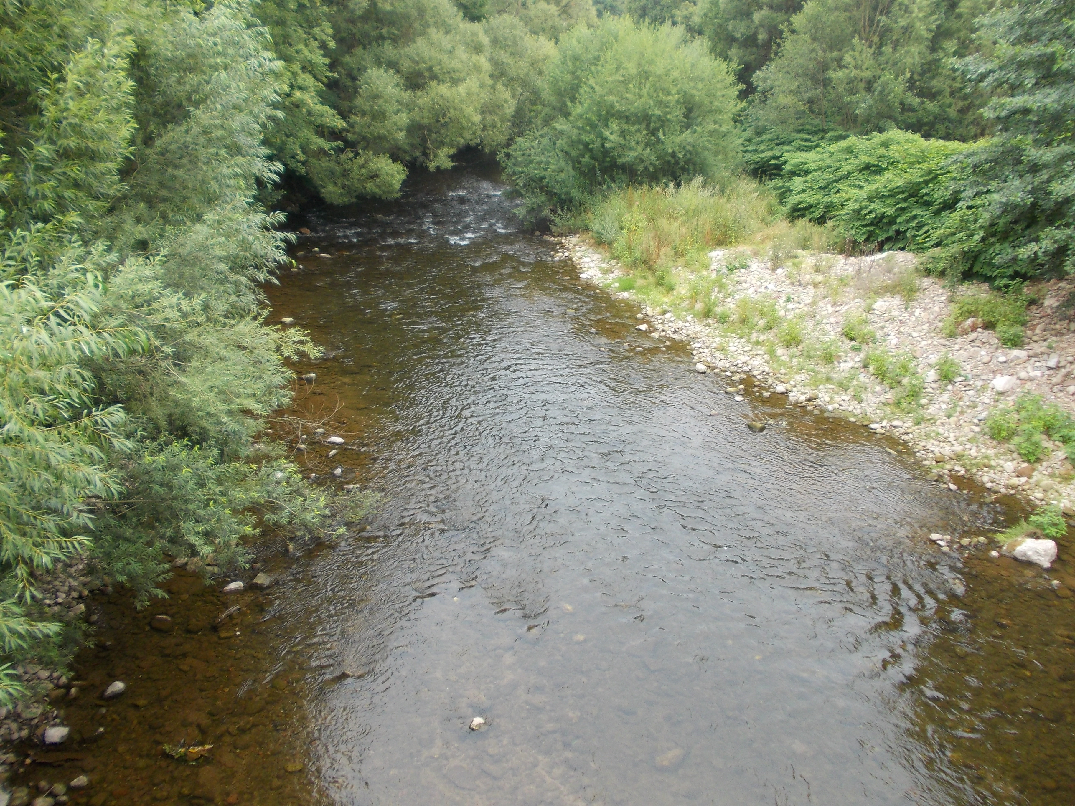 EVL Labe - Hostinné